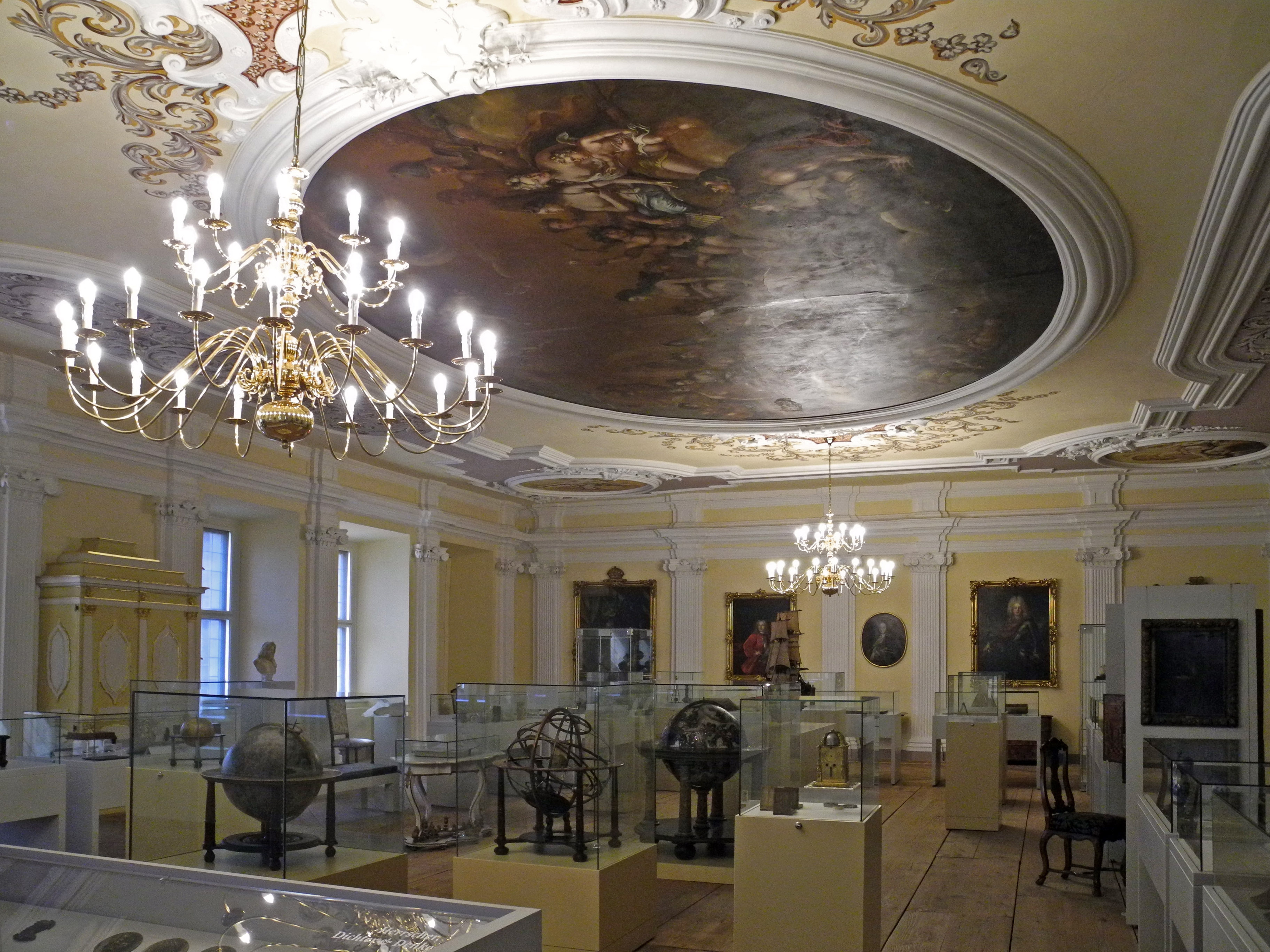 Kulturhistorisches Museum im ehem. Franziskanerkloster: Barocksaal im Heffterbau